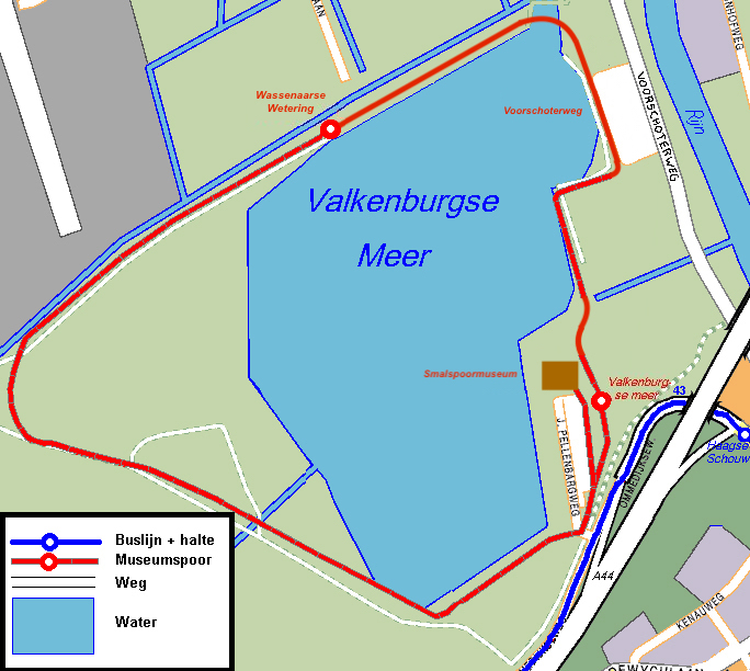 Alle stremmingen zijn voorbij. Het kaartje hierboven geeft de route weer per 1 november 2006. Net buiten het kaartje valt de bushalte Voorschoterweg, niet ver van de gelijknamige tramhalte (loopafstand plm. 250 meter). Bij deze bushalte stopt lijn 32 Zoetermeer Centrum-West - Katwijk Rijnsoever v.v.